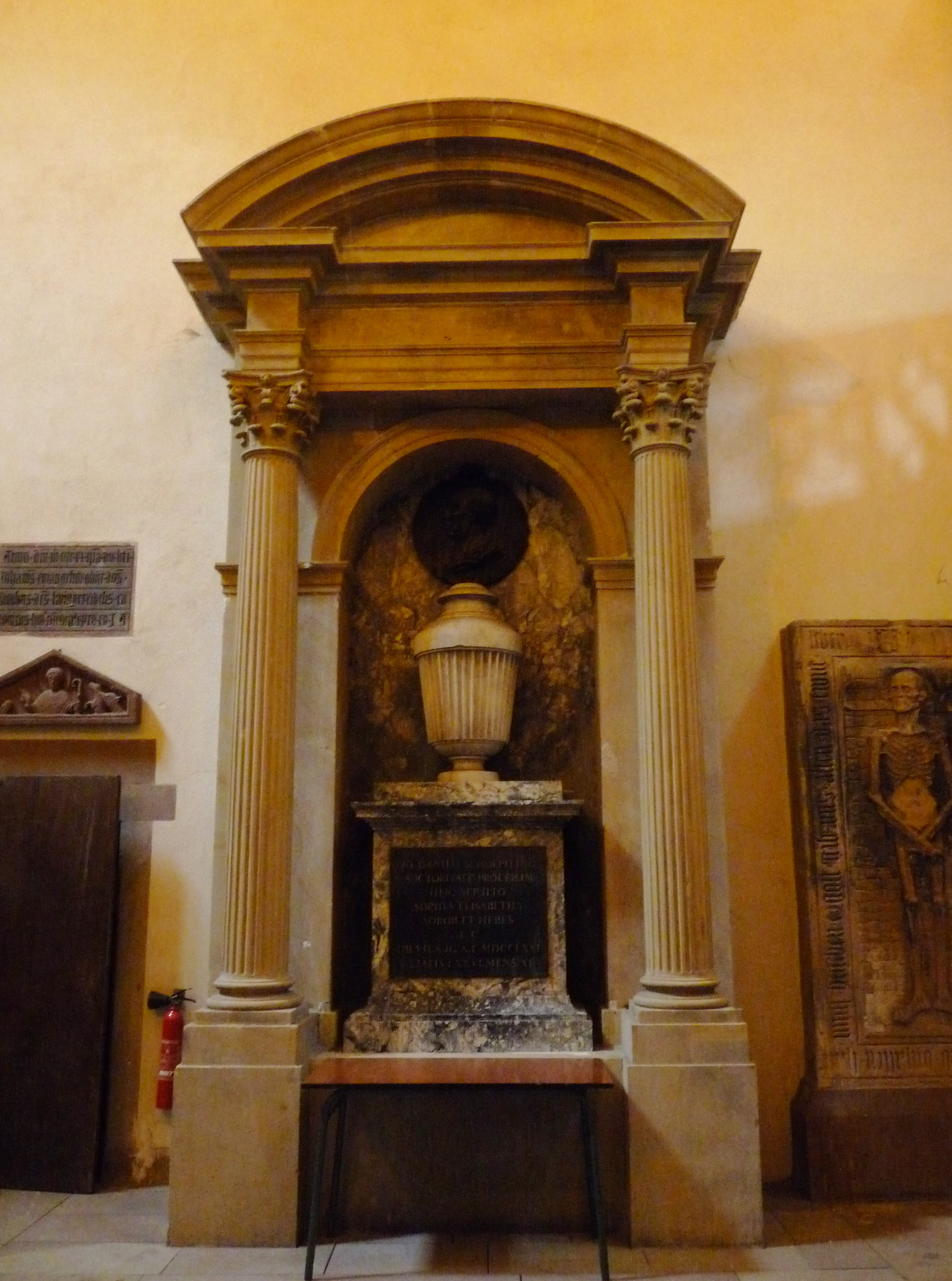 Monument funéraire de l'historien Jean Daniel Schoepflin à l'église Saint-Thomas de Strasbourg (1773-1776)